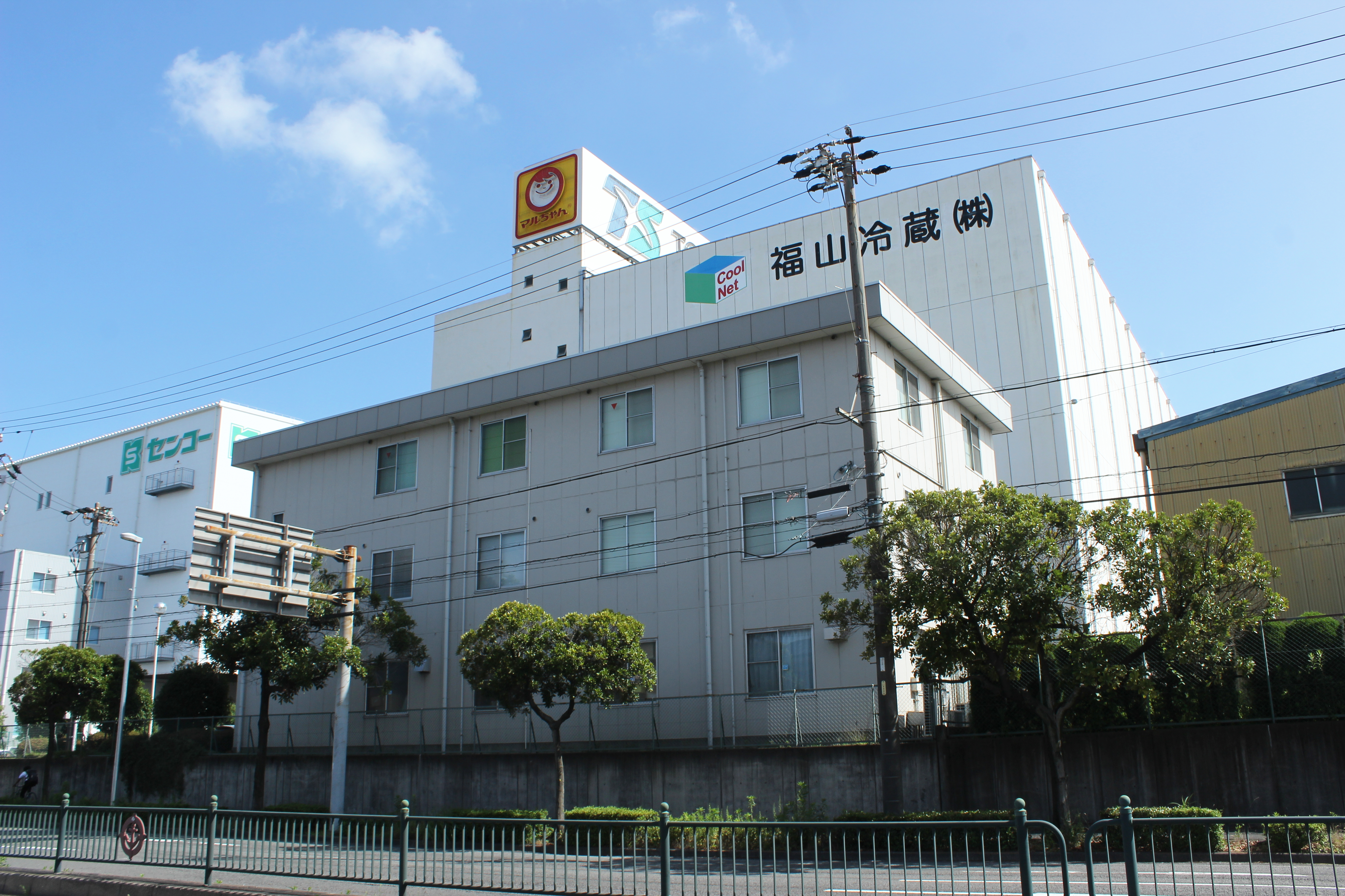 名古屋市港区千年3丁目の東洋水産